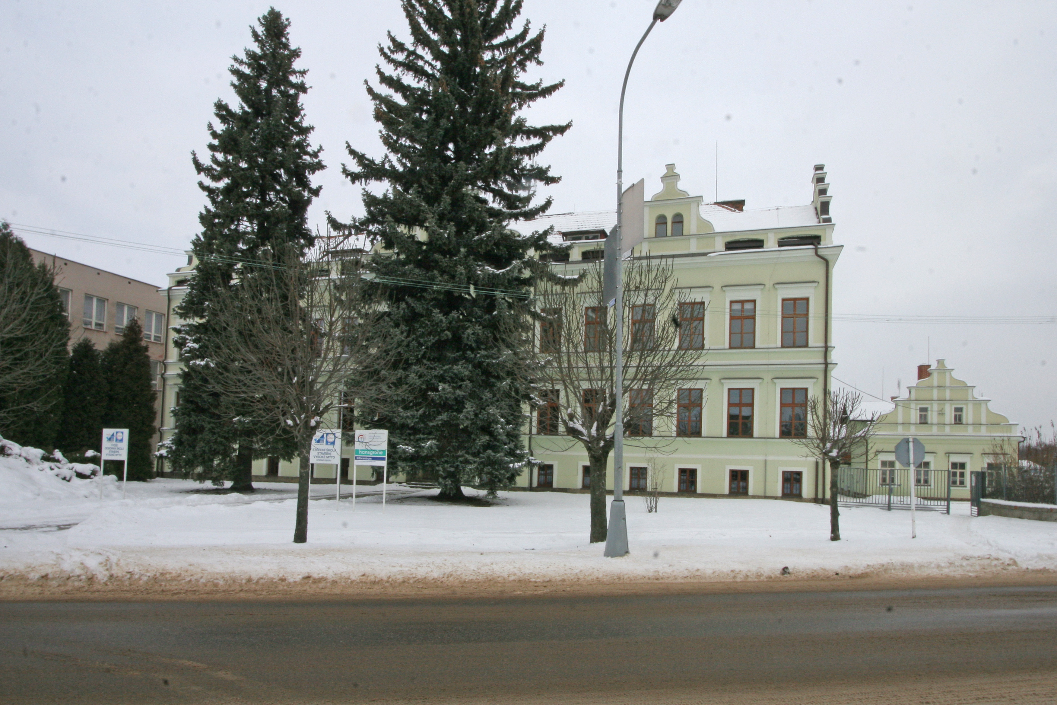 Kpt. Poplera č.p. 272